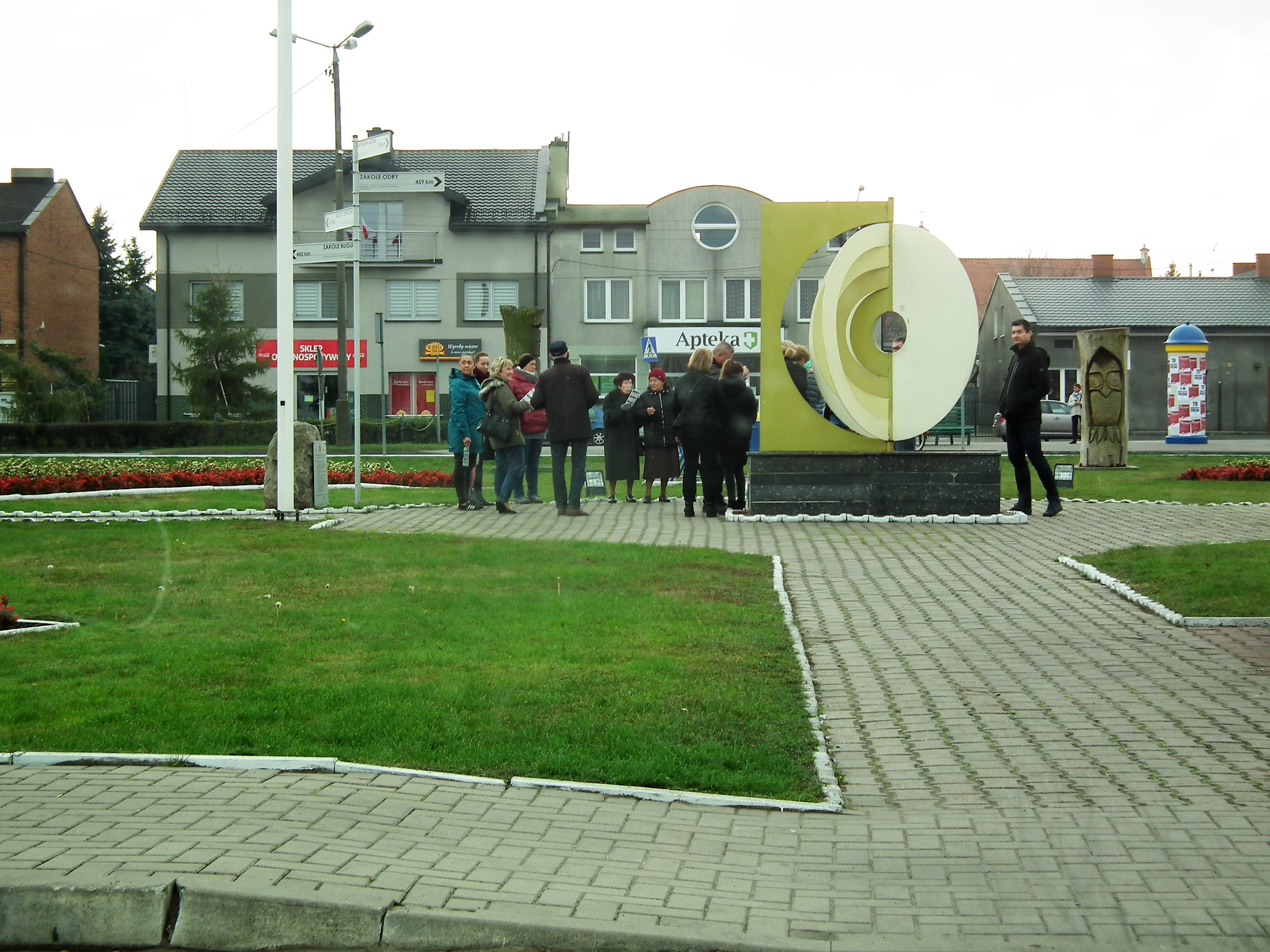 Rynek w Piątku - środek Polski.